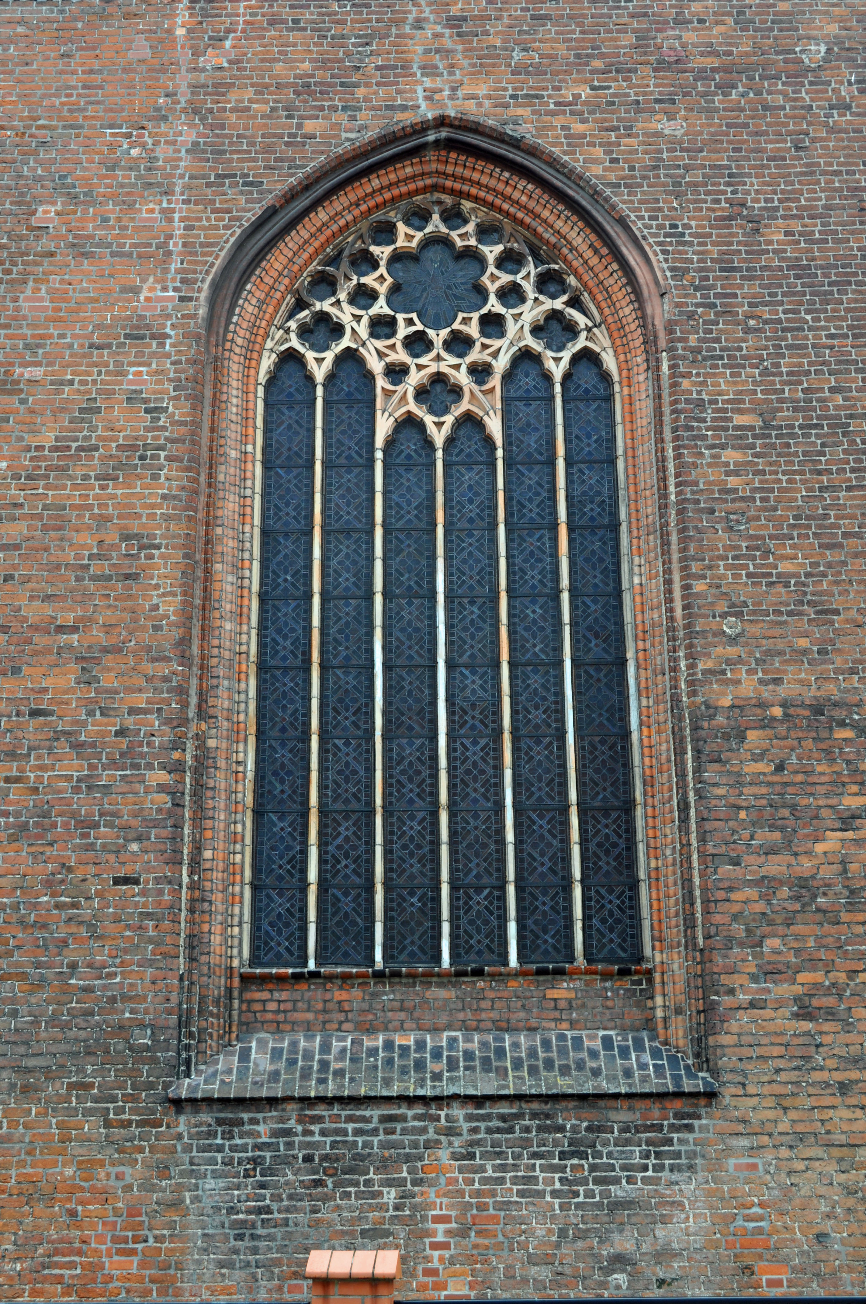 Gryfice (Powiat Gryficki), b (2011-08-05) by Klugschnacker in Wikipedia